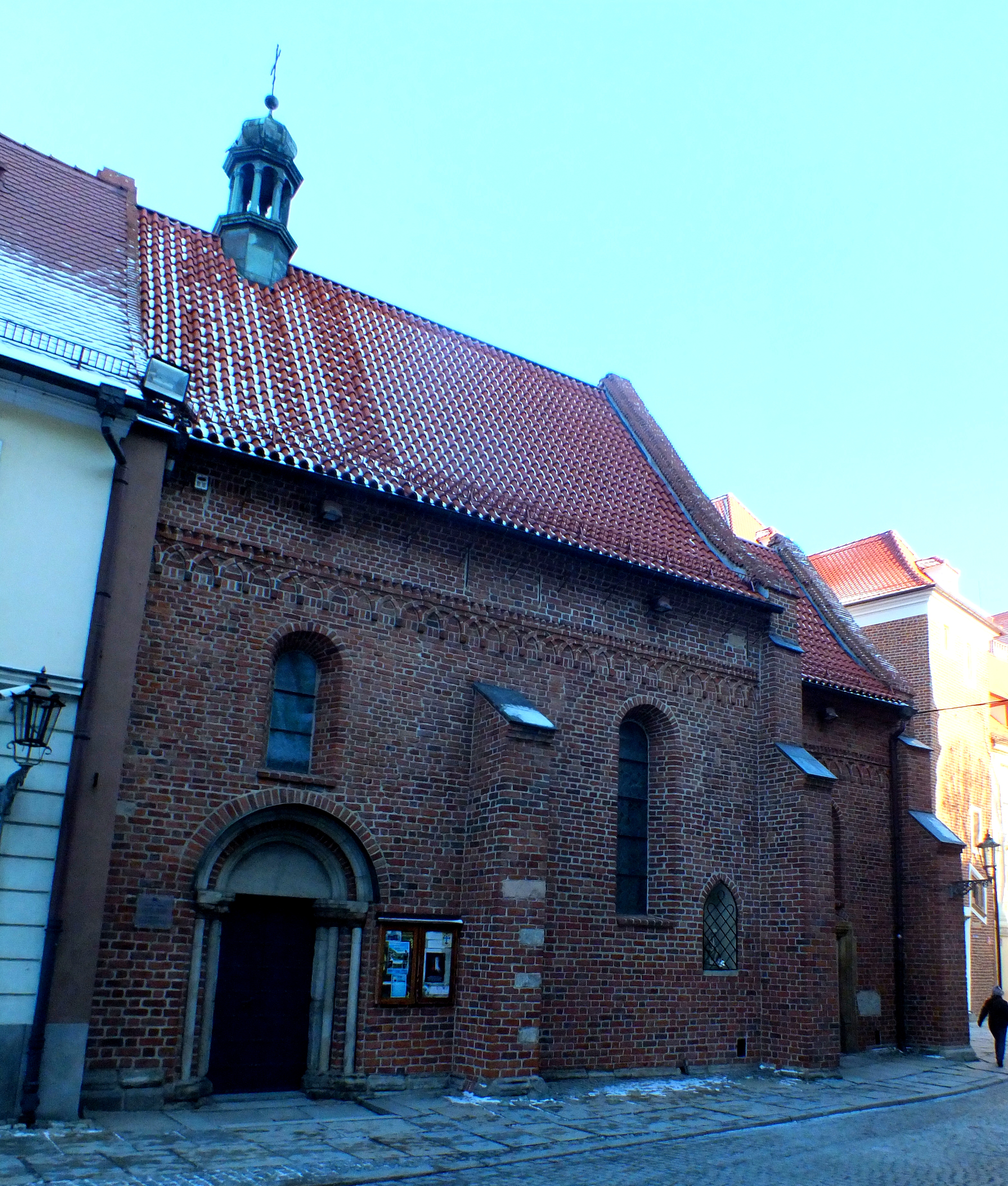 Wrocław, kościół św. Idziego (pl. Katedralny 17a)